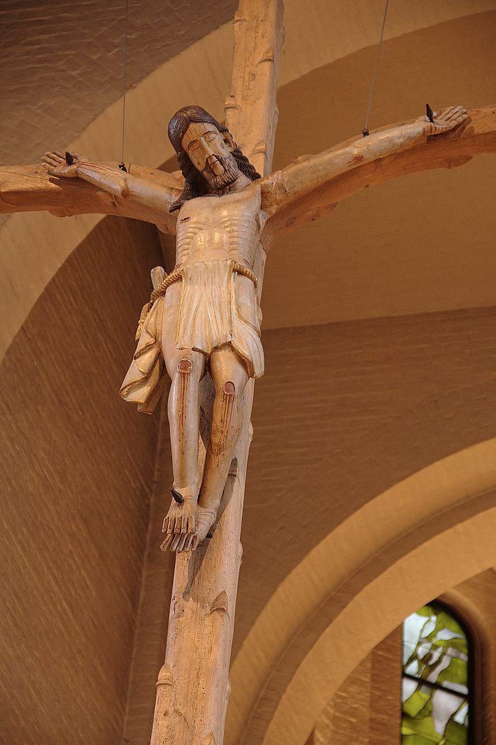 Das frühgotische Hängekreuz über dem Volksaltar